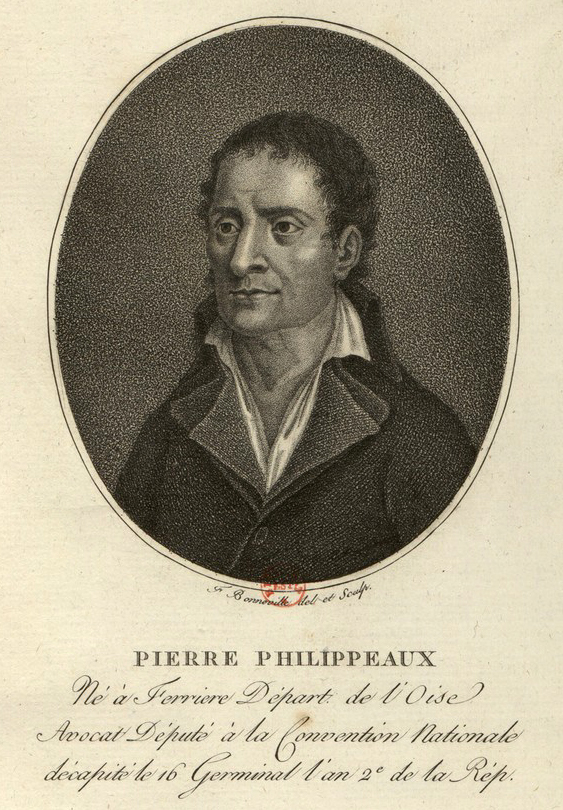 Pierre Philippeaux : né à Ferrières département de l'Oise, avocat député à la Convention nationale décapité le 16 germinal l'an II de la République, estampe.